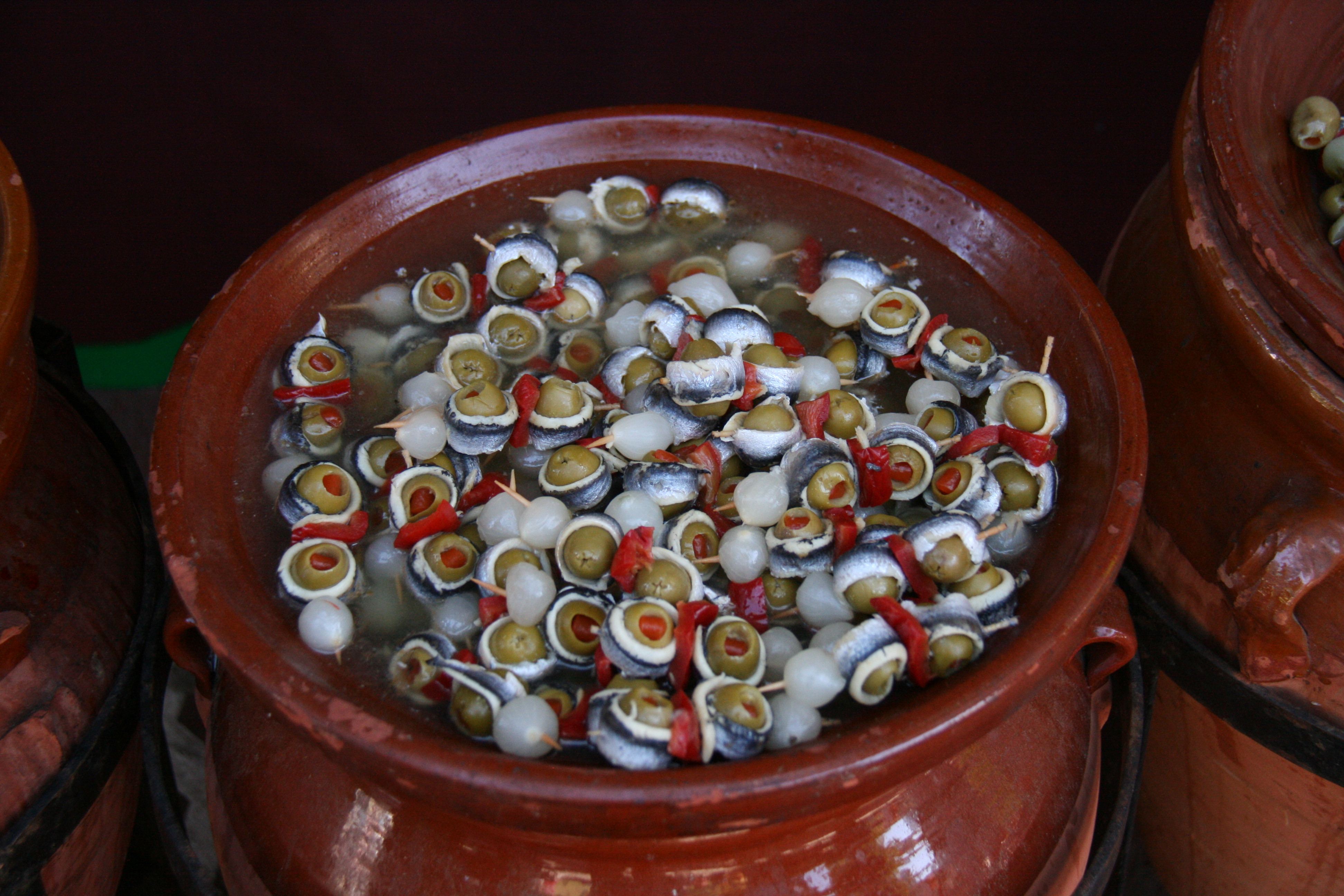 Encurtdos